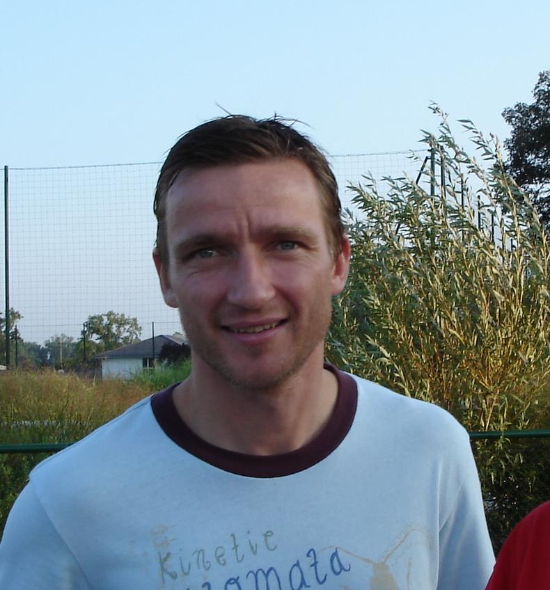 Vladimir Smicer, joueur des Girondins de Bordeaux